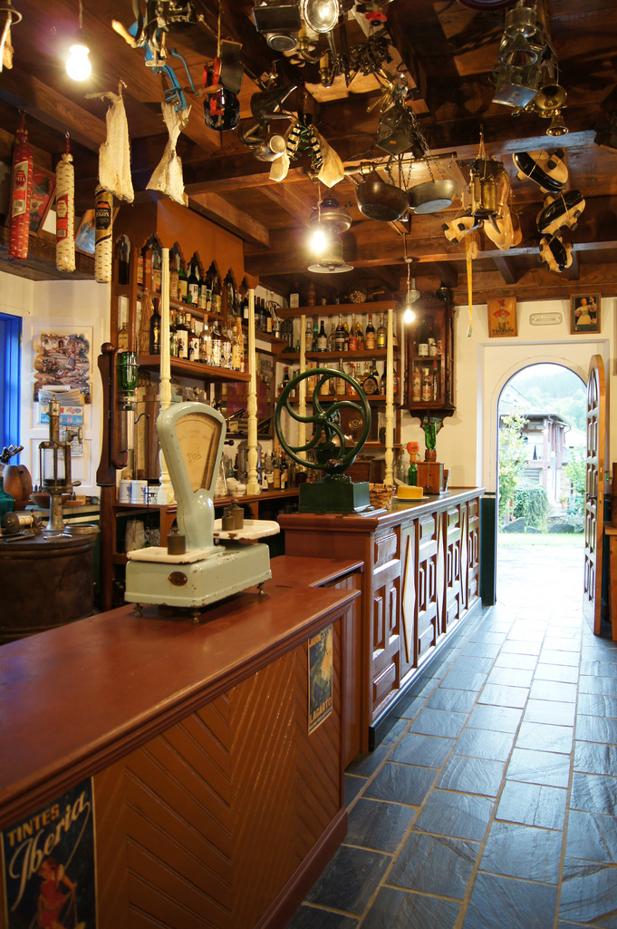 Las tiendas mixtas o colmados de ultramarinos, que eran aquellos magníficos lugares donde había de todo un poco y donde más que clientes se tenían amigos. Ethnographic Museum of Grandas de Salime Native nameMuseo Etnográfico de Grandas de SalimeLocationGrandas de Salime, Asturias , (Spain)Coordinates43° 13′ 03.9″ N, 6° 52′ 28.4″ W Established1986Web page control : Q2879455 VIAF: 262007074 LCCN: n98032370 BNE: XX254091 WorldCat institution QS:P195,Q2879455